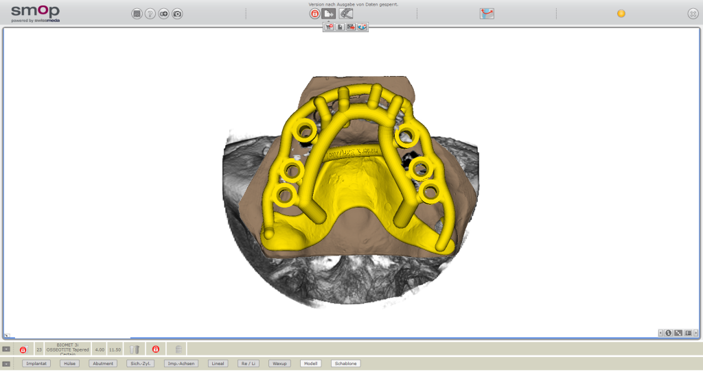 Planungstool für navigierte Implantologie: DVT, Modell-STL, Schablone abgebildet